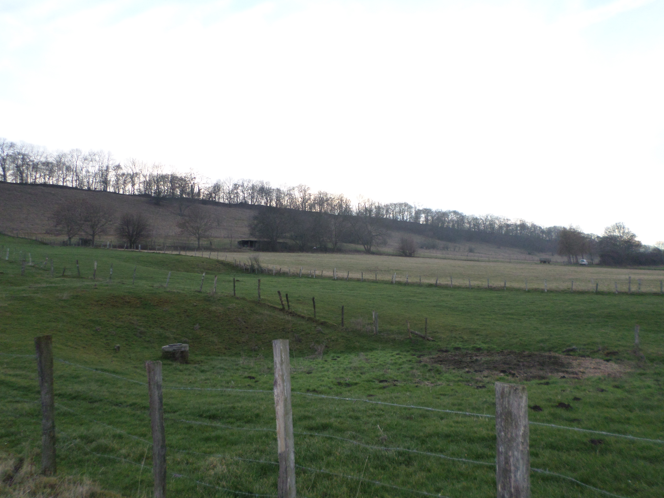 Butterberg aus nördlicher Richtung, Bad Harzburg; abgebildeter Bereich im LSG „Harz (Landkreis Goslar)“